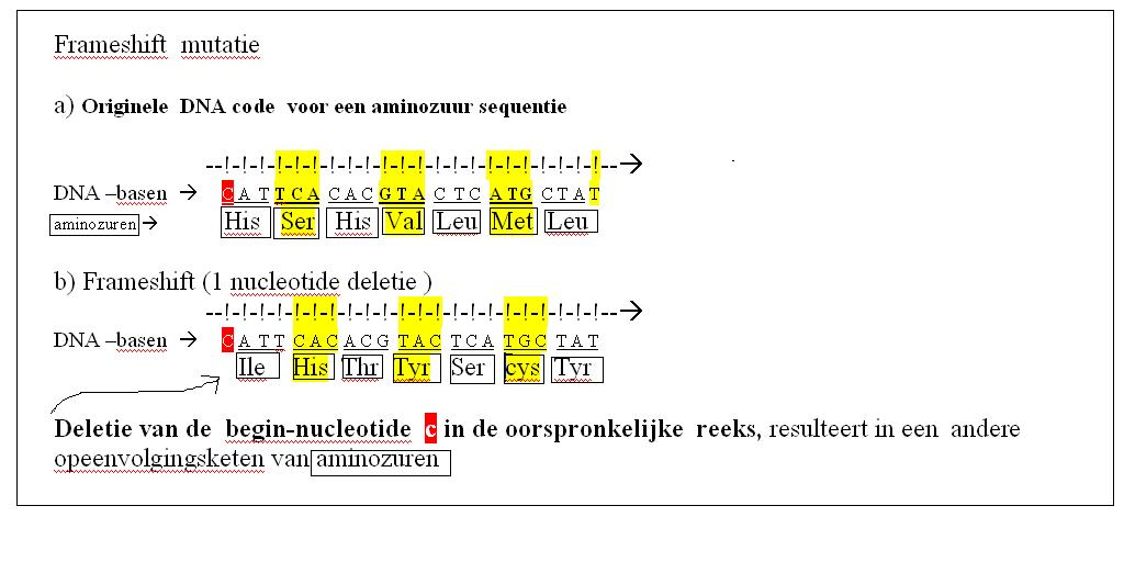 Frameshift mutatie